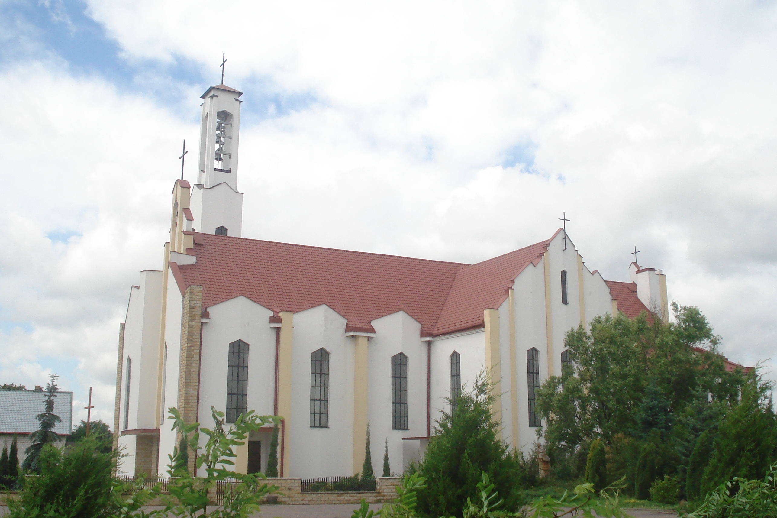 Kosciół Narodzenia NMP w Szydłówku k. Szydłowca